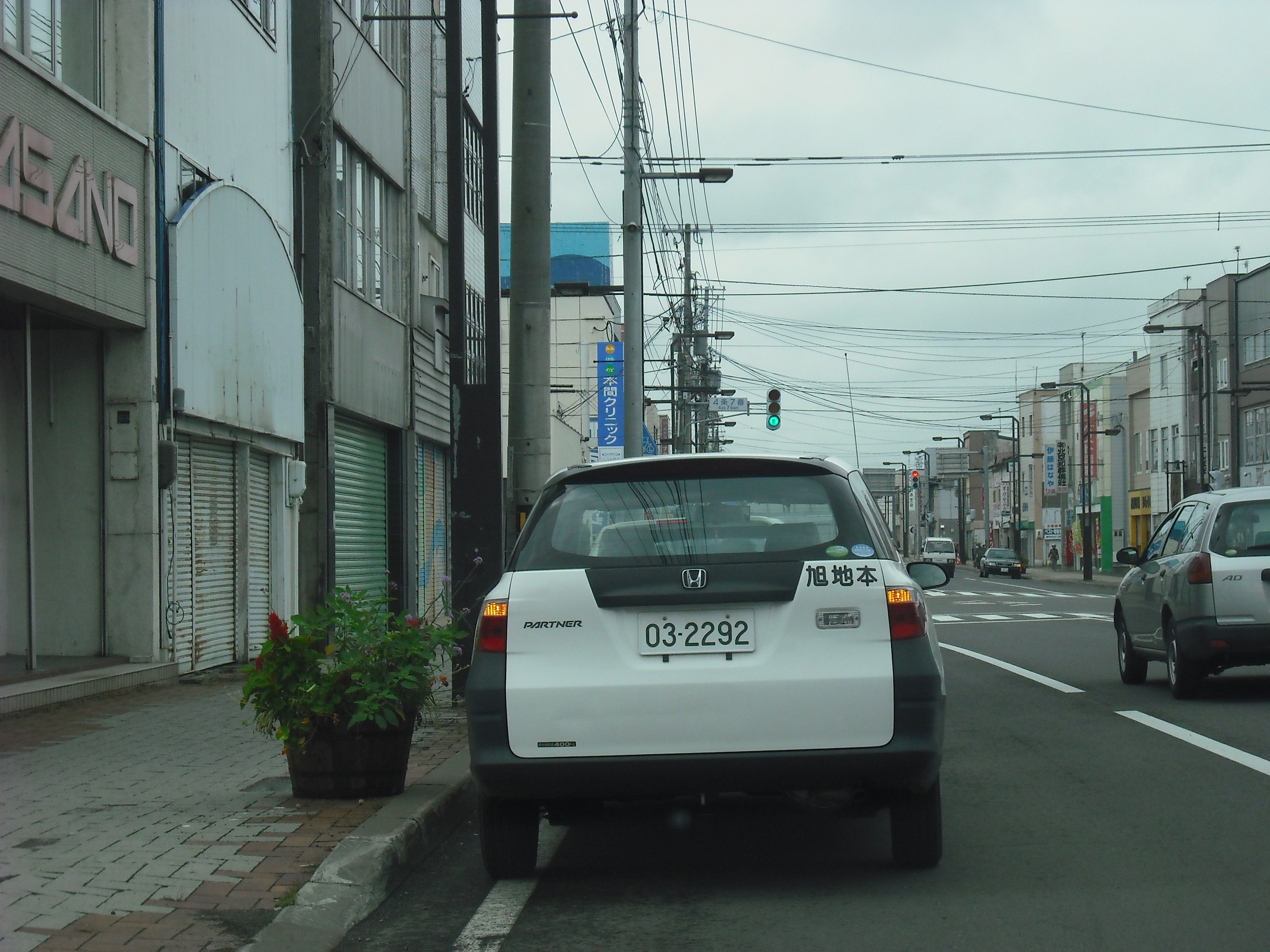 深川市にて、広報活動中の業務車2号。旭川地方協力本部の車両